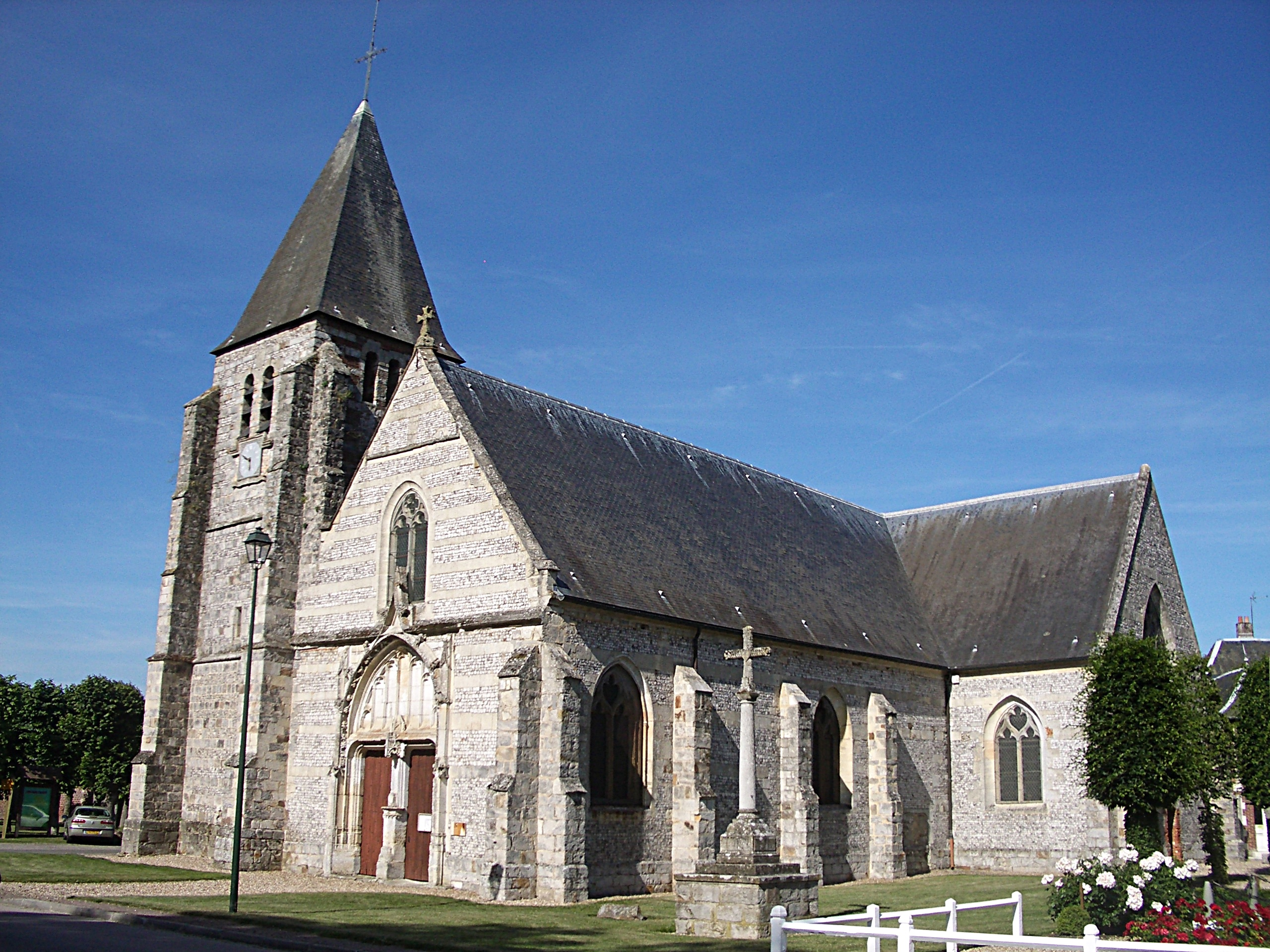 L'église saint Sulpice à Heudicourt (Eure).